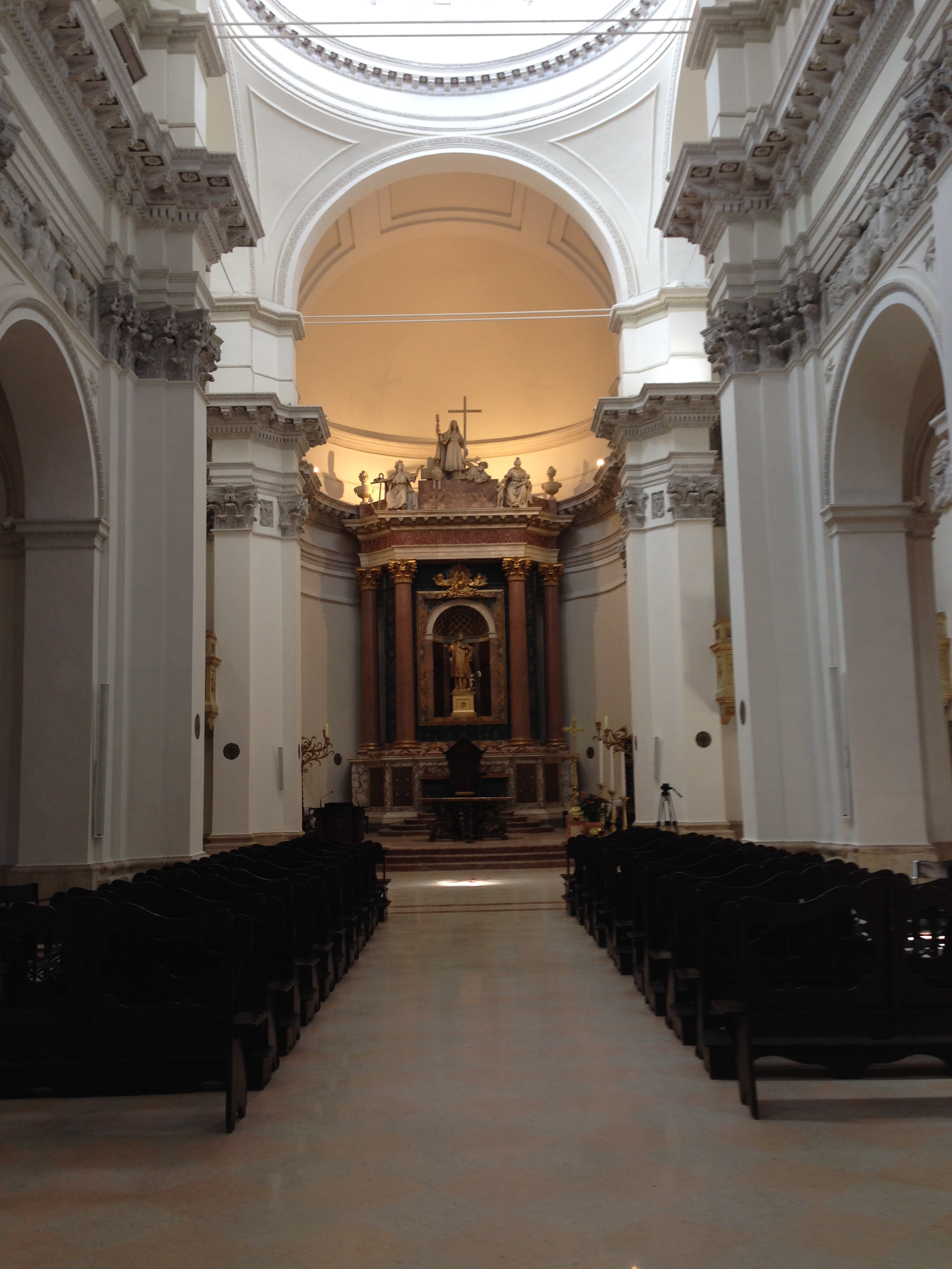 Chiesa di San Filippo Neri. Spoleto